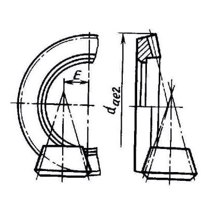 Гипоидное смещение.